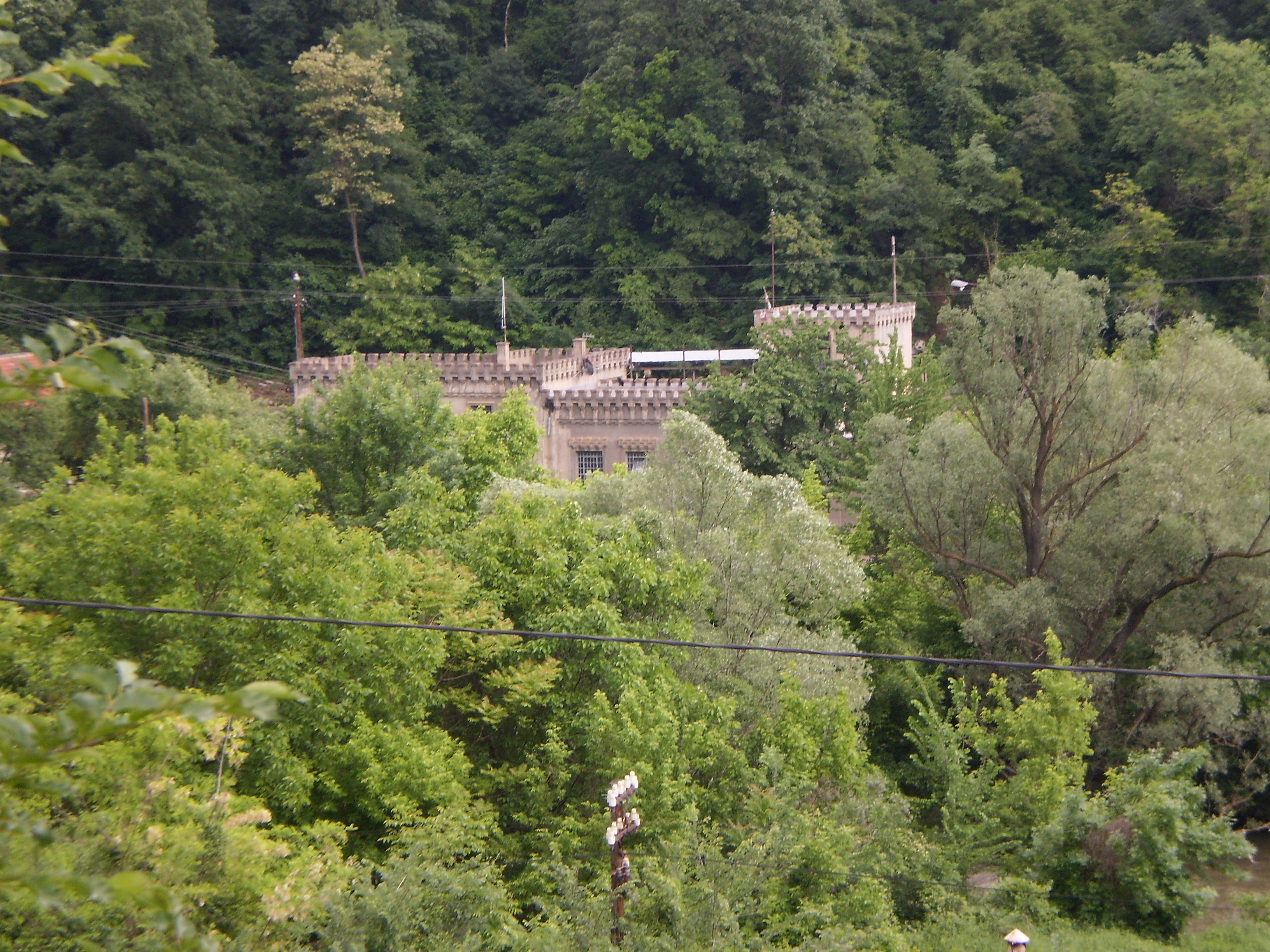 Hidrocentrala "Sićevo" na Nišavi u Sićevačkoj klisuri